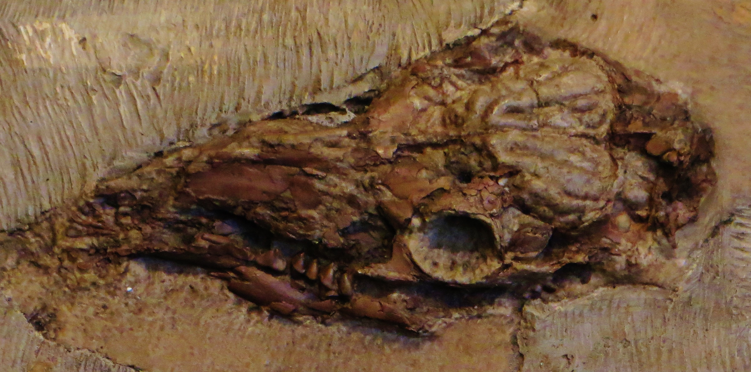 Fossil of Xiphodon, an extinct mammal - Took the photo at Musee d'Histoire Naturelle, Paris